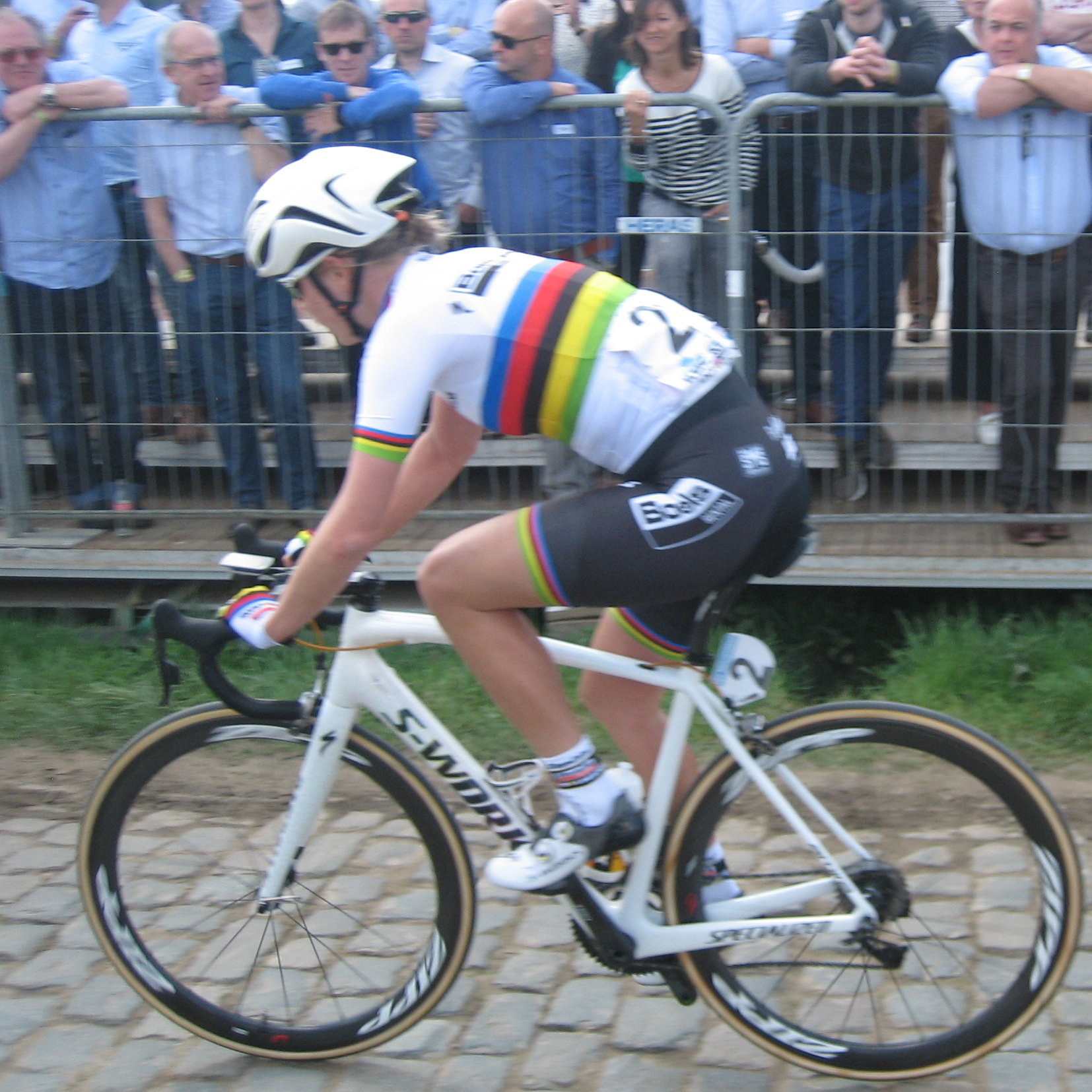 Amalie Dideriksen (wereldkampioene) op de Oude Kwaremont in de Ronde van Vlaanderen voor vrouwen 2017.